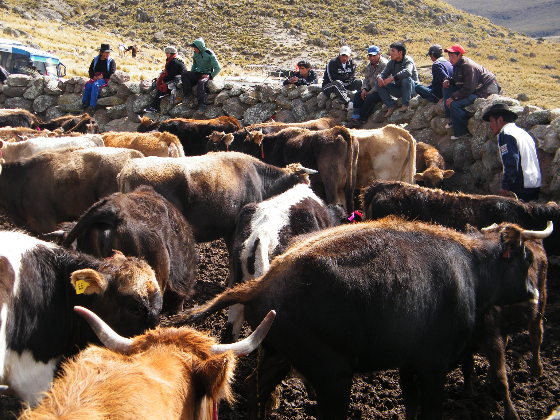 Fiesta de la herranza en la comunidad de Sacsamarca, Ayacucho, Perú.